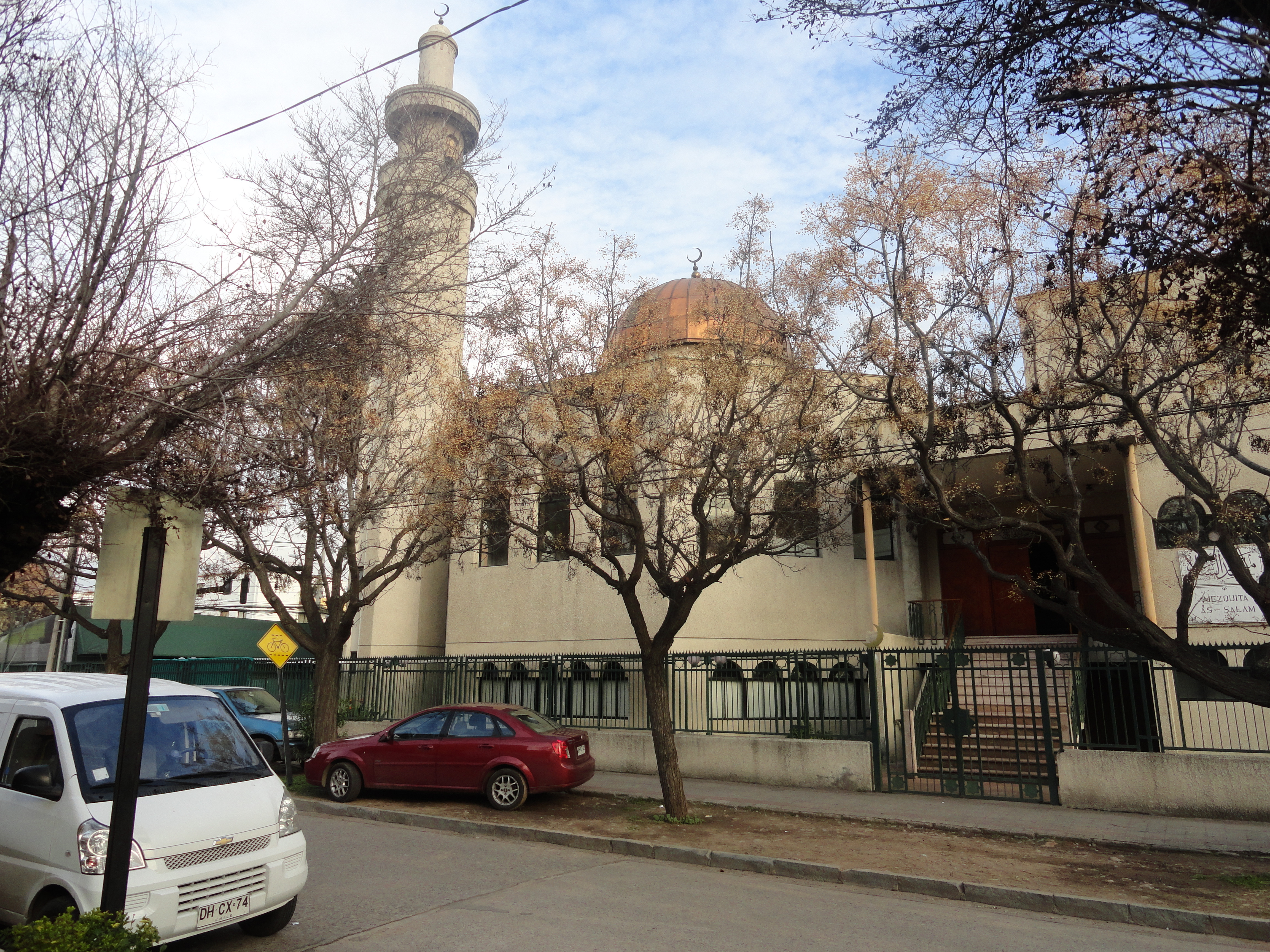 Mezquita